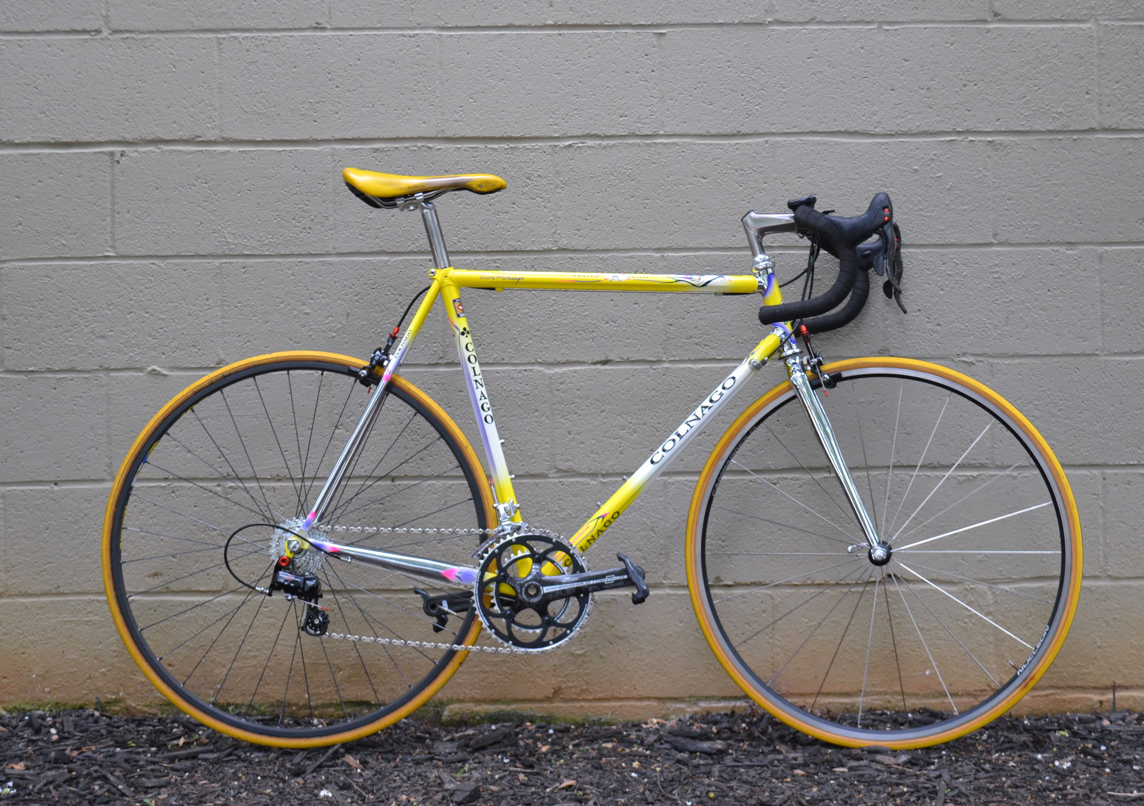 Colnago Master Campagnolo Centaur 10 Speed 001